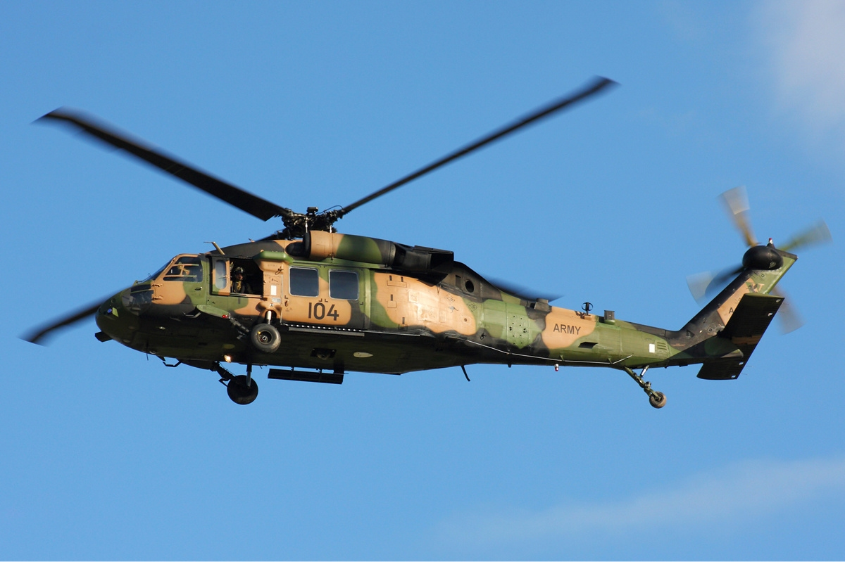 Australian Army Sikorsky (Hawker de Havilland) S-70A-9 Black Hawk